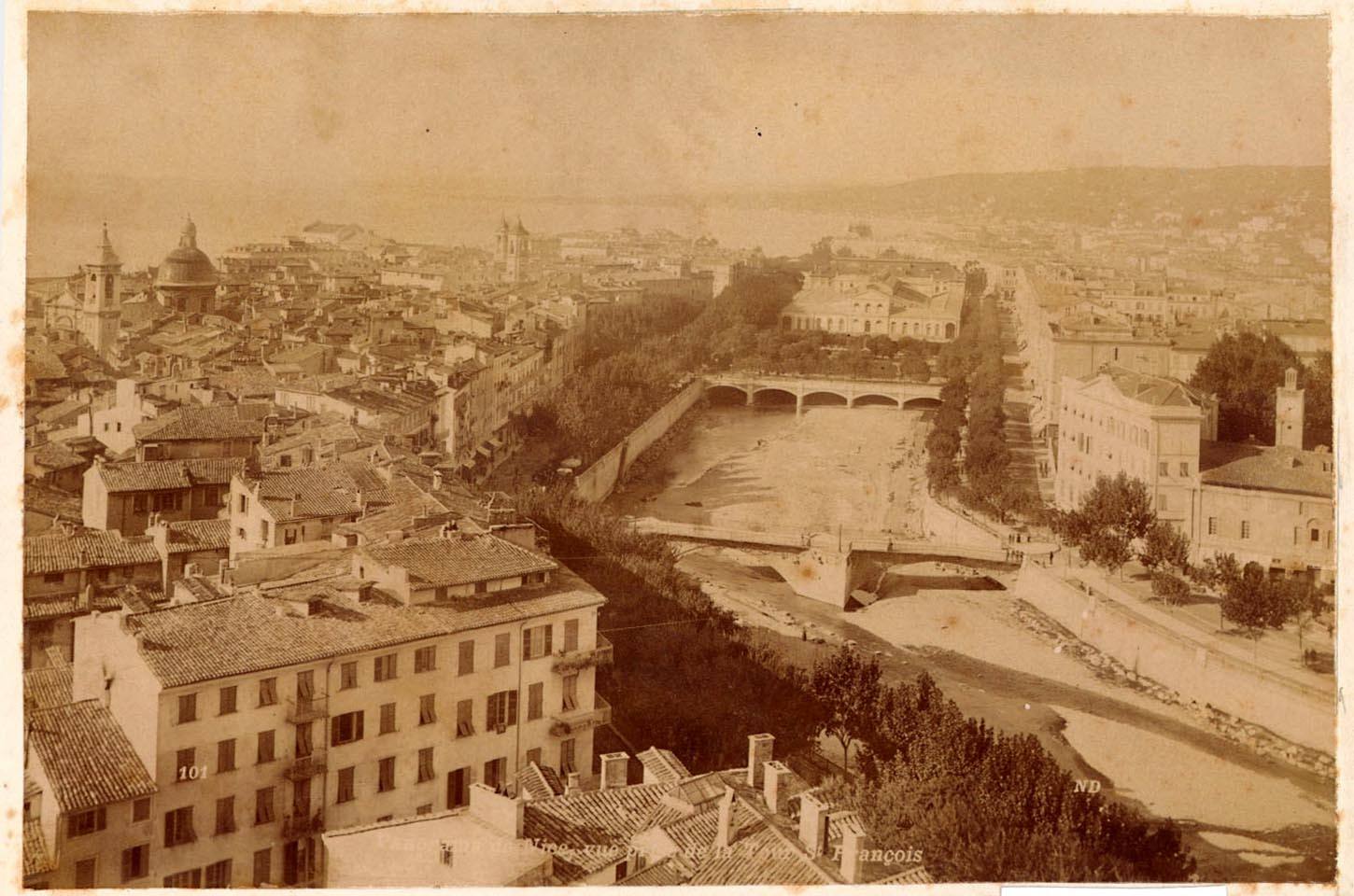 Au premier plan, le Pont Vieux "version moderne" , en second plan le pont neuf (construit en 1820 et deuxième ouvrage à traverser le Paillon depuis le Moyen Âge), au fond le Casino municipal.